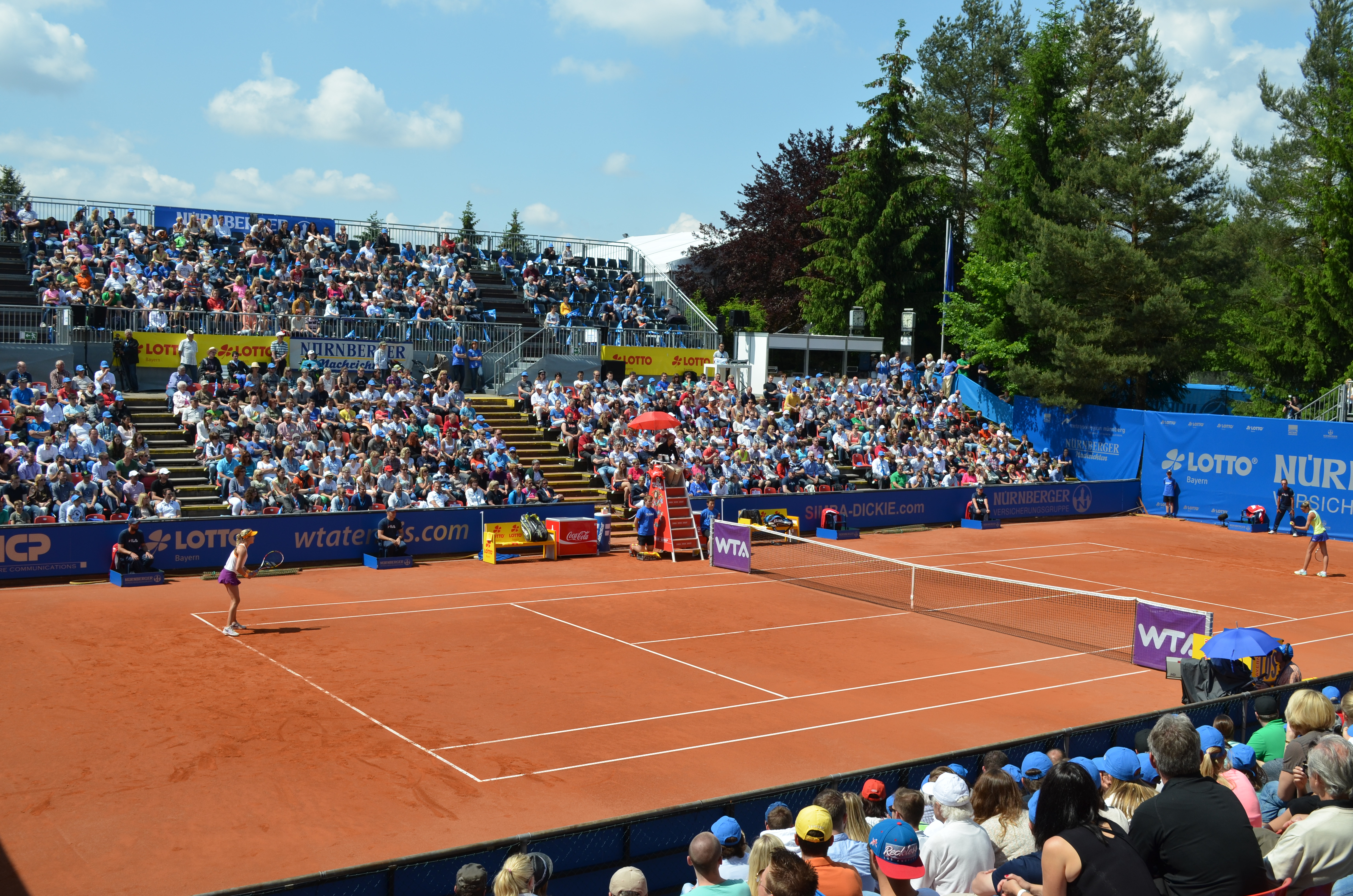 Centercourt des 1.FCN Tennis am Finaltag des Nürnberger Versicherungscup 2014 beim Spiel von Eugenie Bouchard gegen Karolina Pliskova